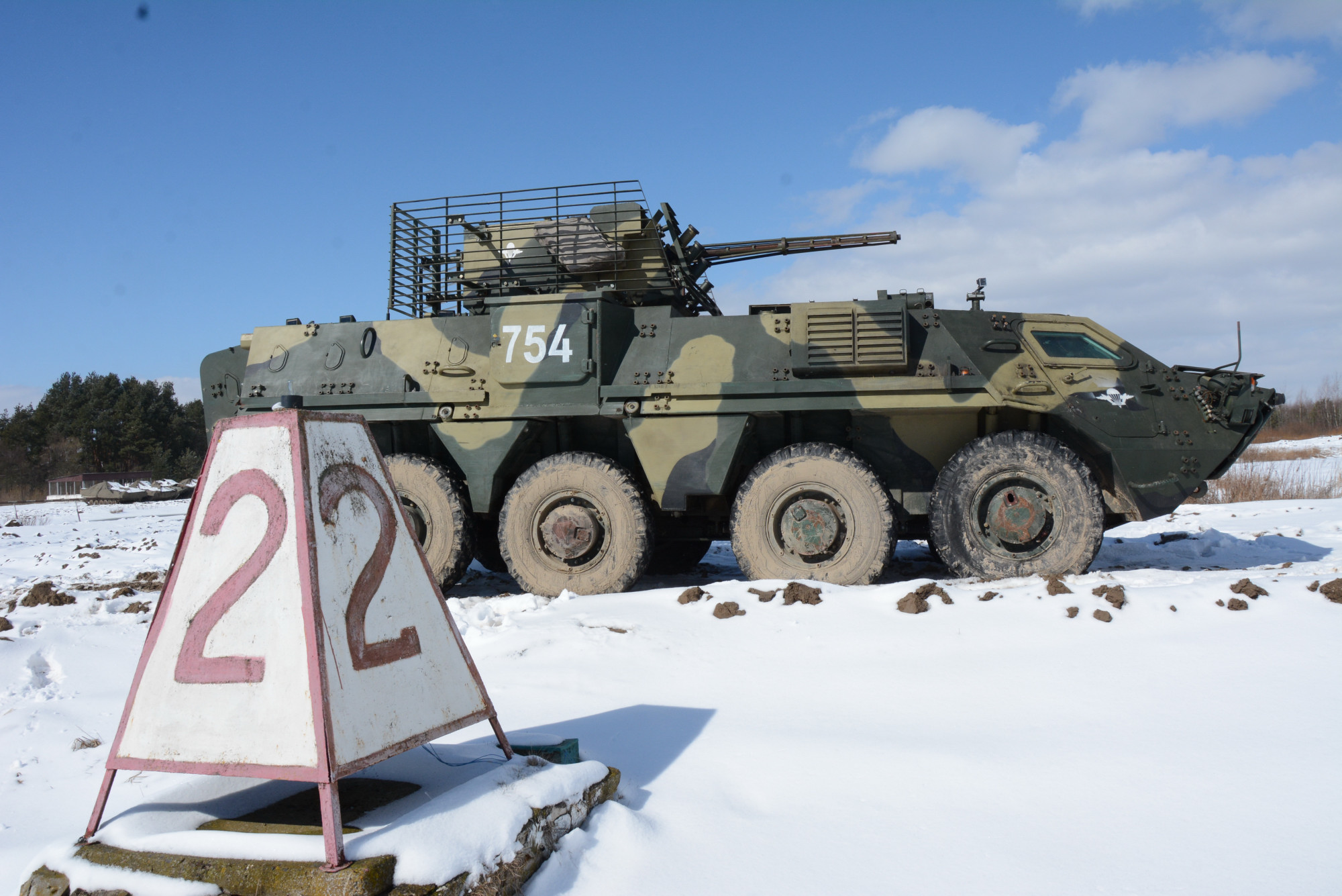 Львівські курсанти опановують сучасну українську броньовану техніку У Міжнародному центрі миротворчості та безпеки триває практичний вишкіл вихованців Національної академії сухопутних військ. На одній із ділянок полігону майбутні офіцери-піхотинці вперше виконали вправи стрільб з озброєння сучасних українських бронетранспортерів БТР-4Е.